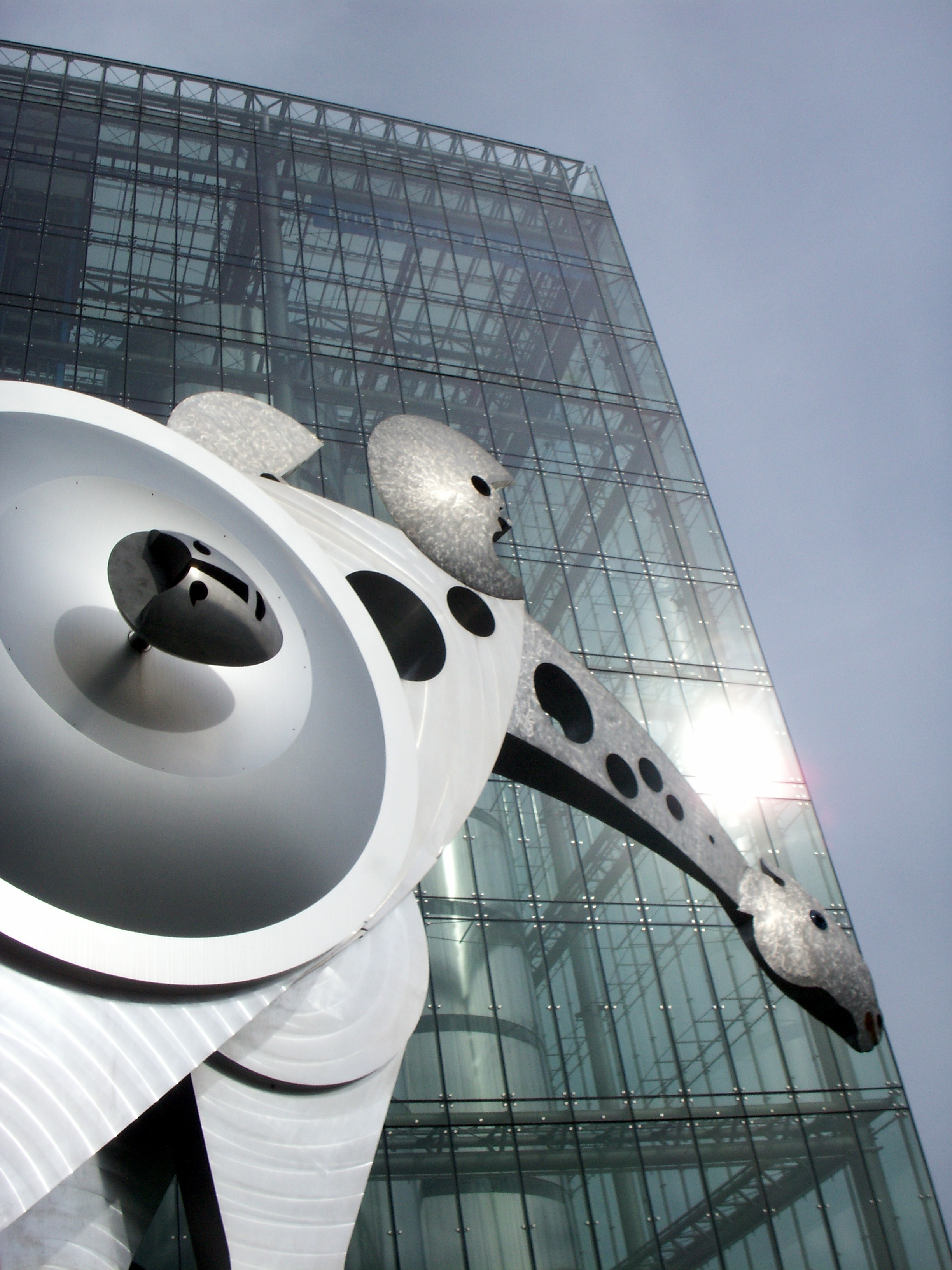 Detail of Print Media Academy, Office and Seminar Building of Heidelberger Druckmaschinen AG in Heidelberg